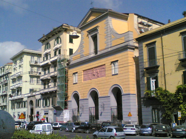 Facciata San Giuseppe a Chiaia, Napoli